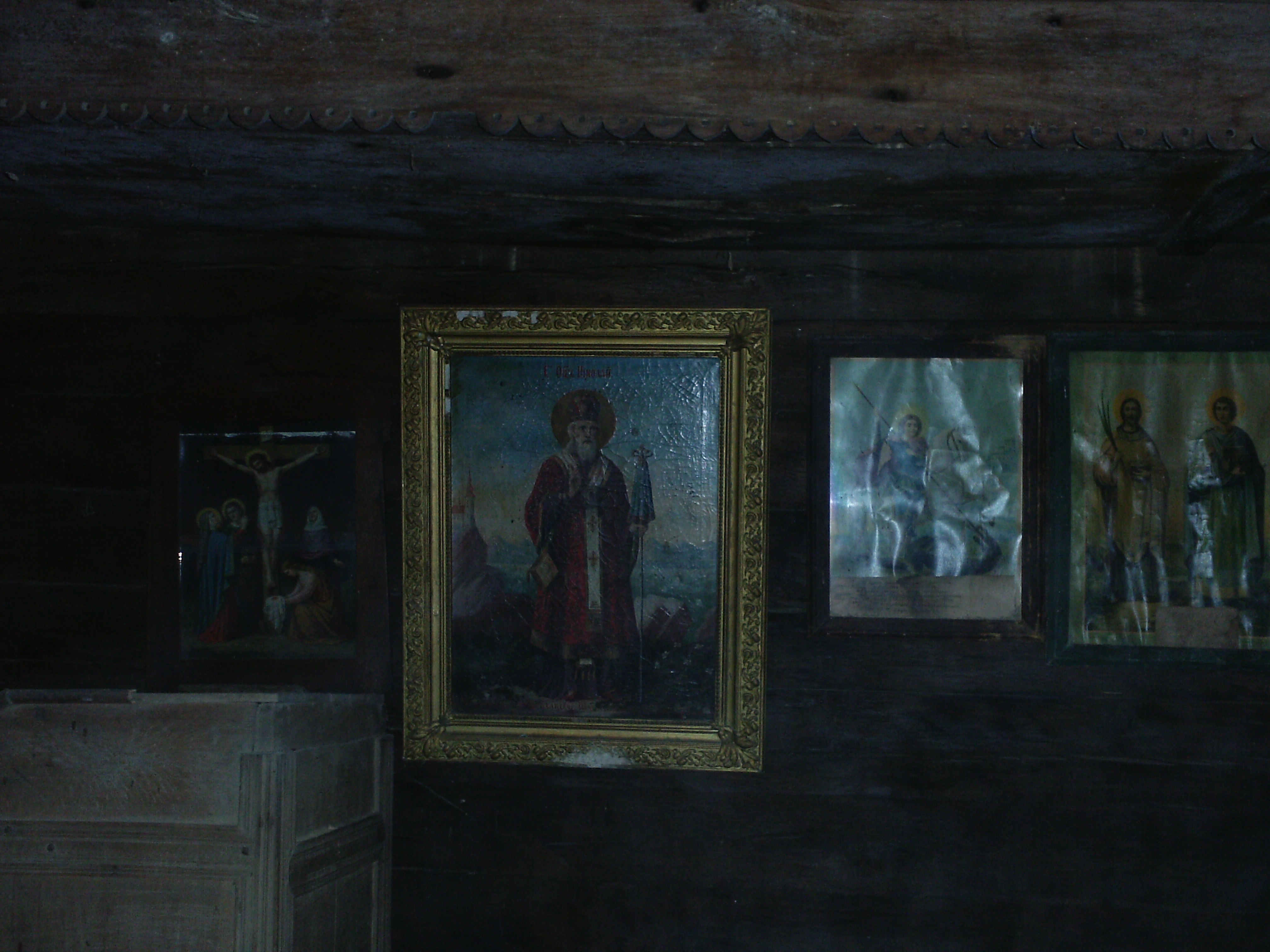 Знаменитости Миличинице